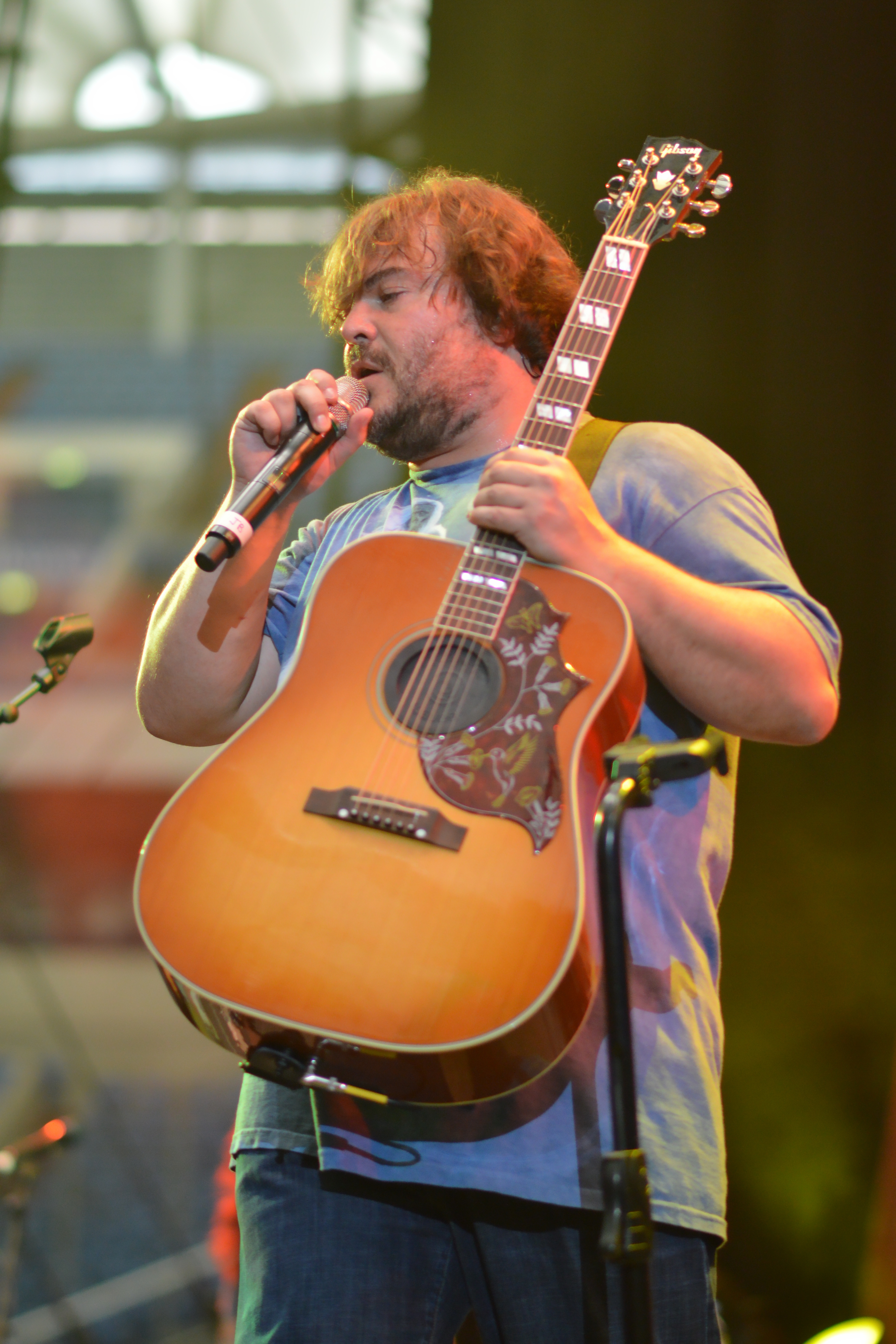 Jack Black von Tenacious_D bei Rock im Pott 2013